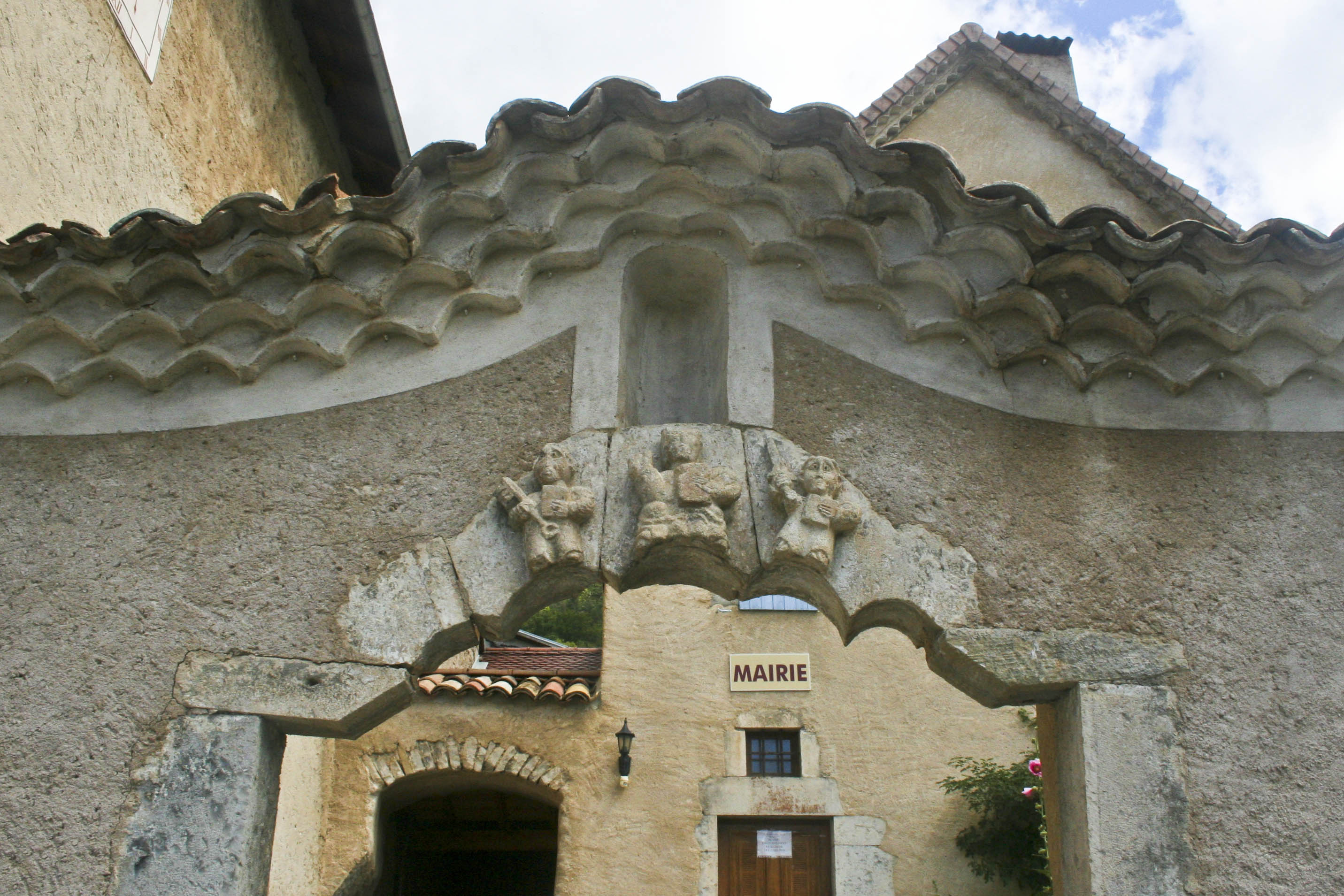 Porche de la mairie de Glandage (Drôme)